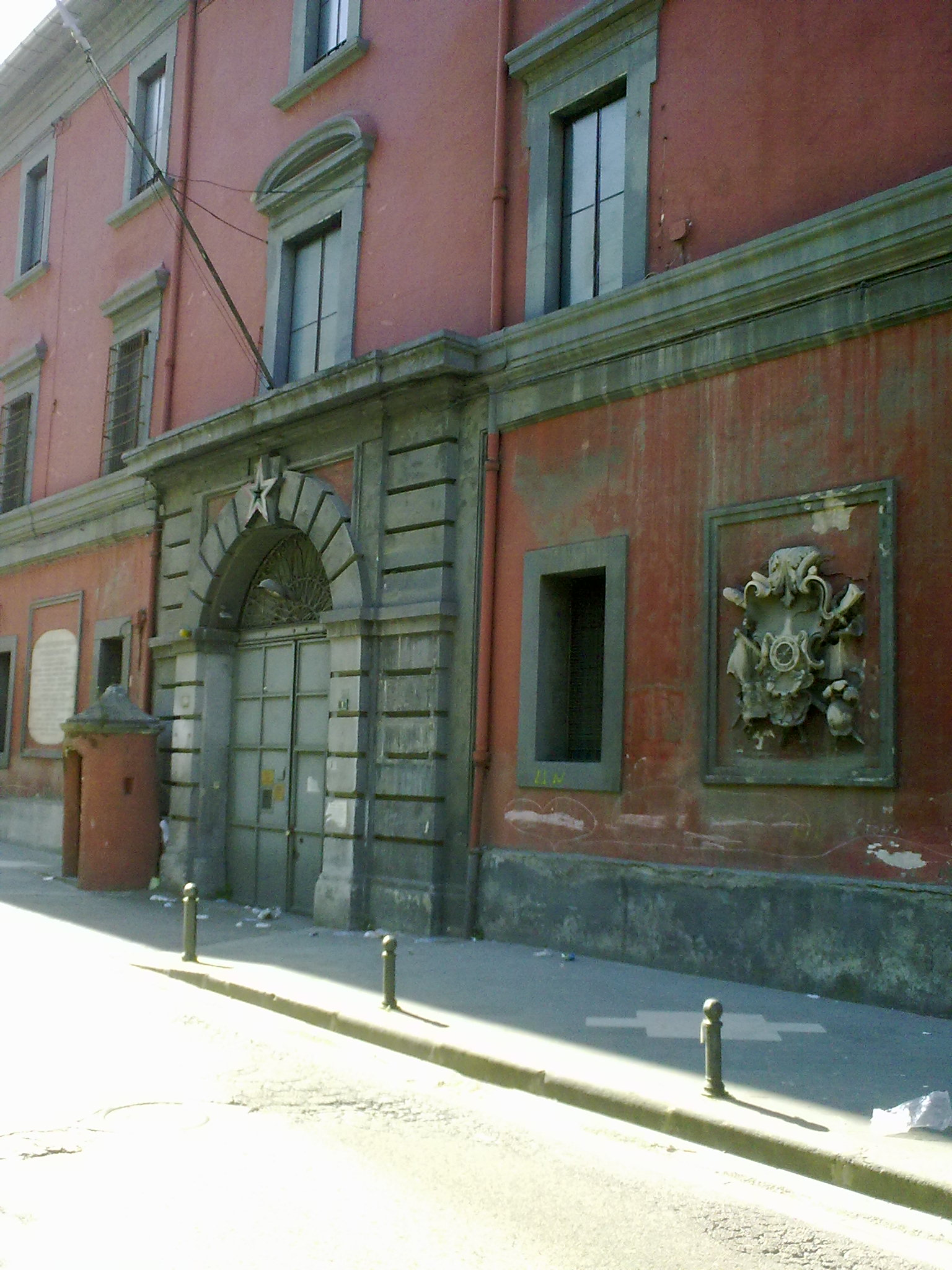 Facciata della Caserma Tofano di Nocera Inferiore